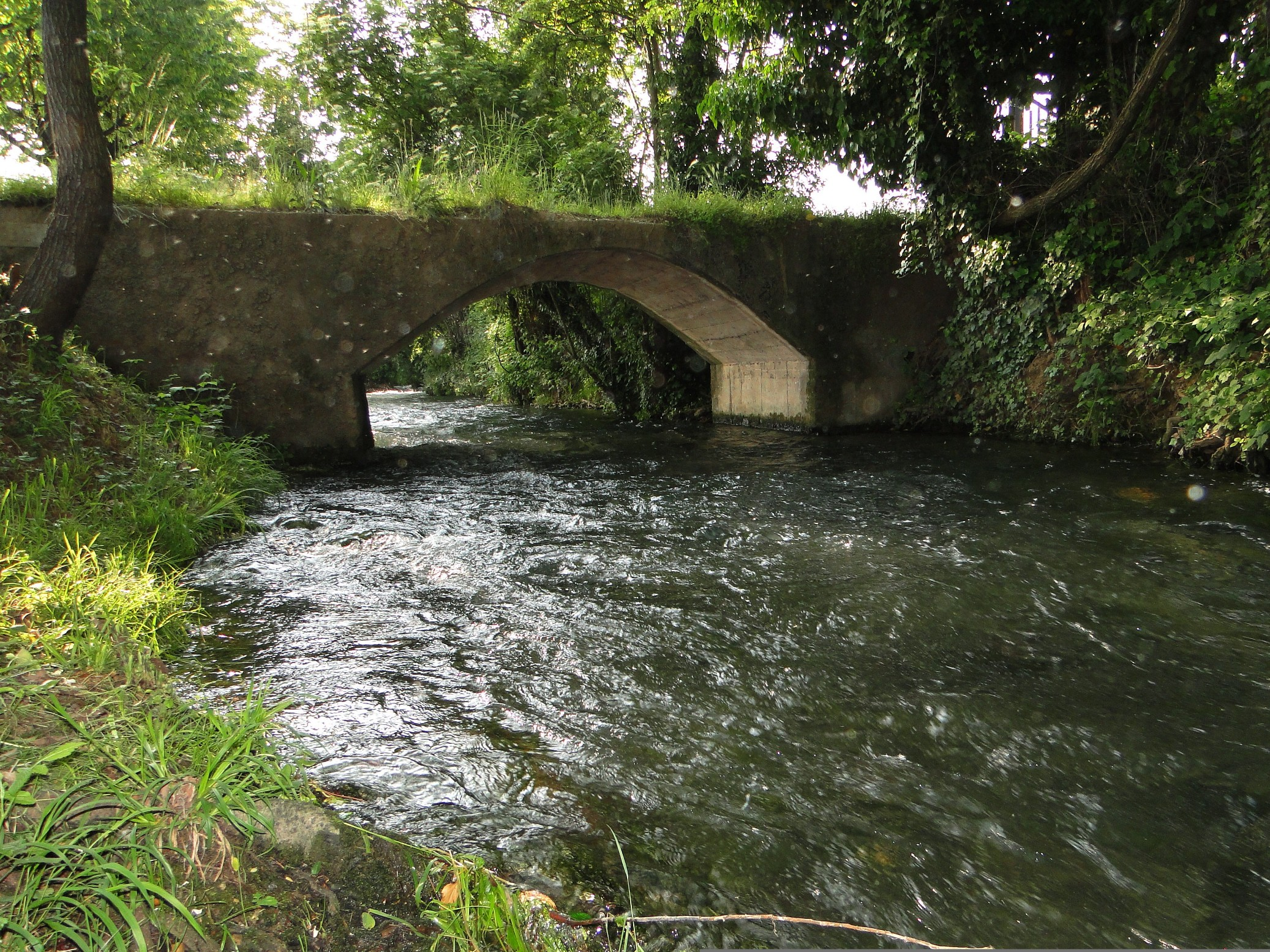 roggia Borgogna tra Scanzo e Pedrengo (BG)